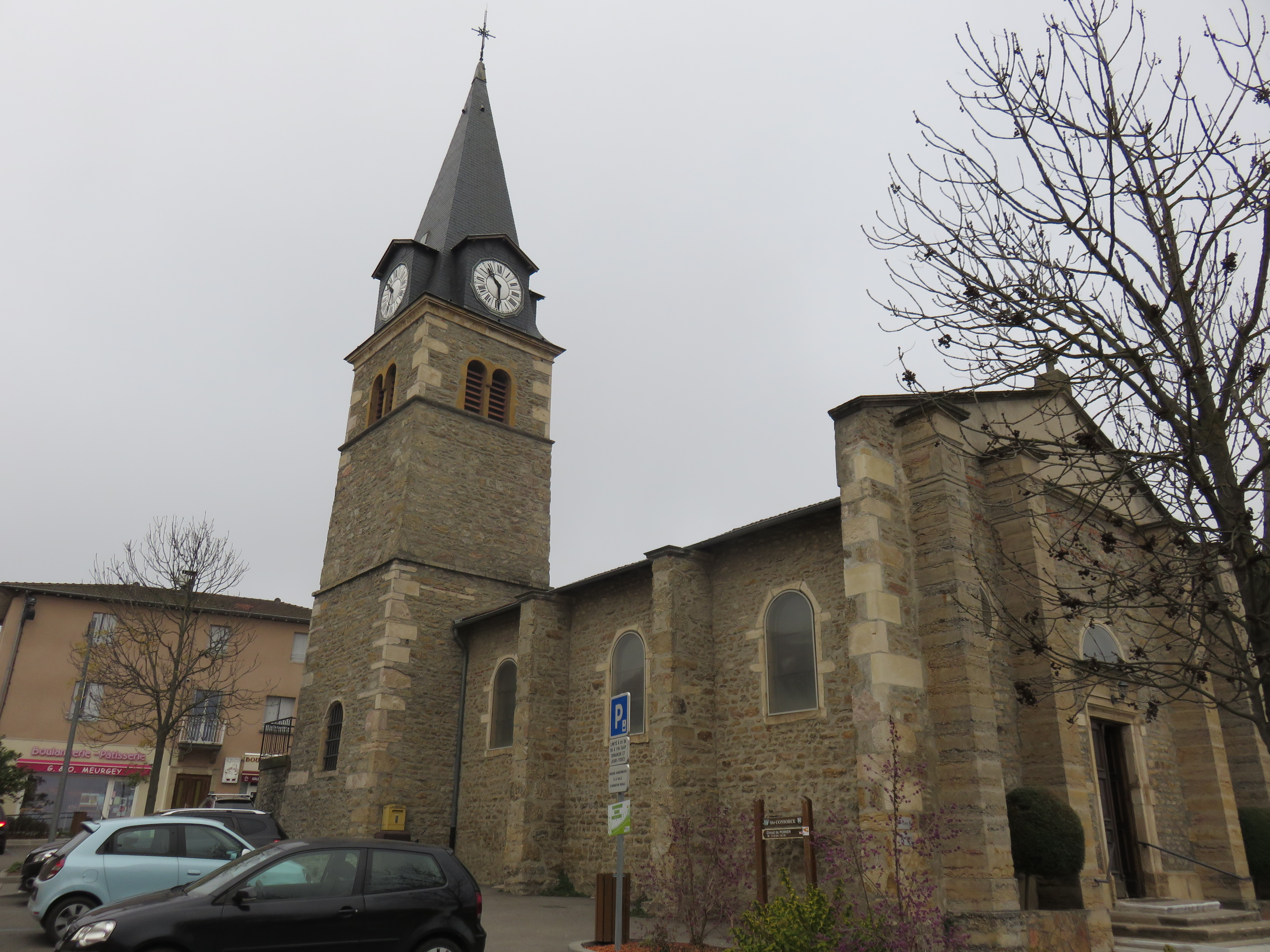 Église Sainte-Consorce de Sainte-Consorce (Rhône, France).